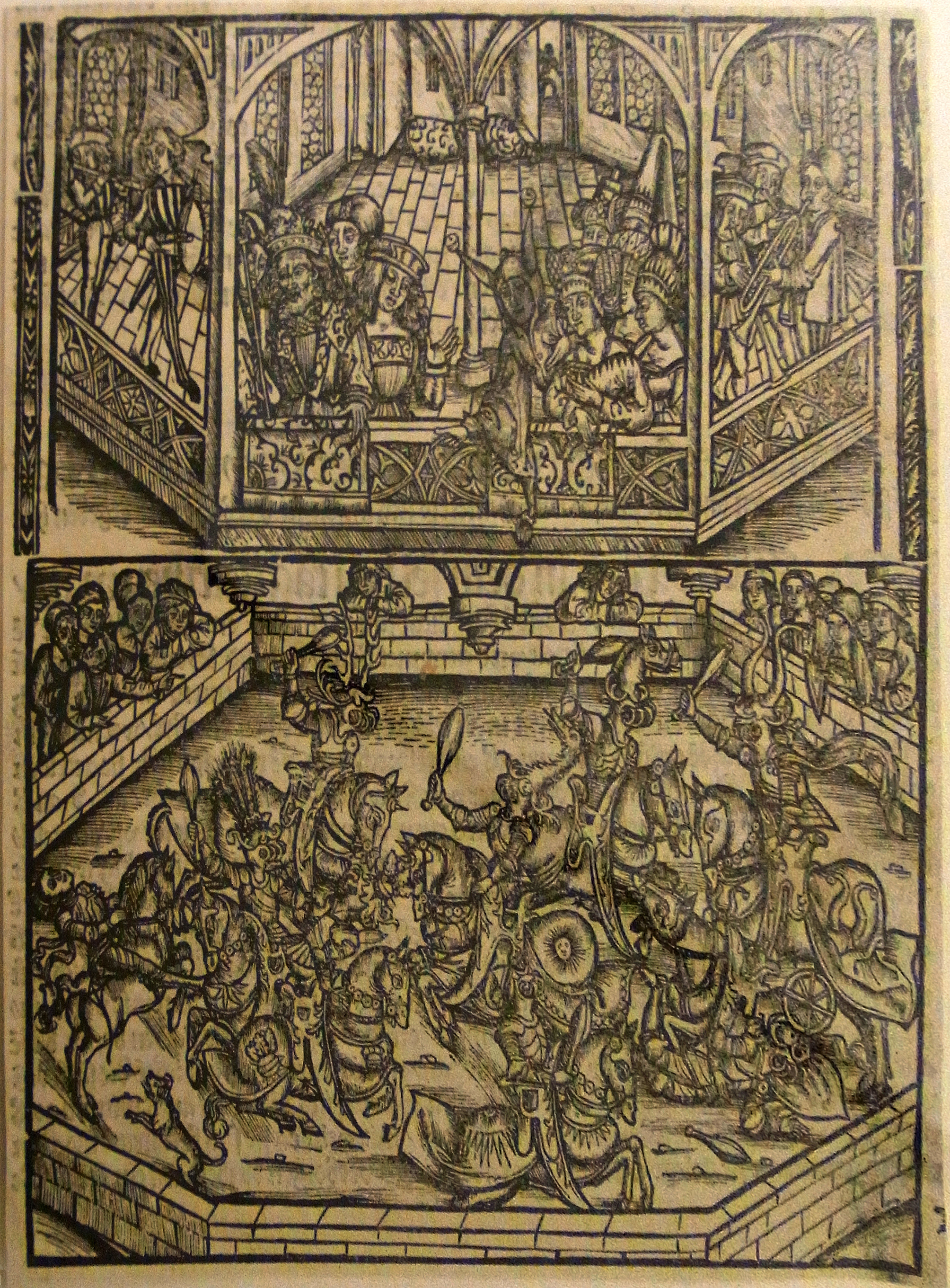 Turnierszene aus "Hans von Bühel: Königstochter von Frankreich" Holzschnitt Johann Grüninger 1500 Suermondt-Ludwig-Museum. Aachen